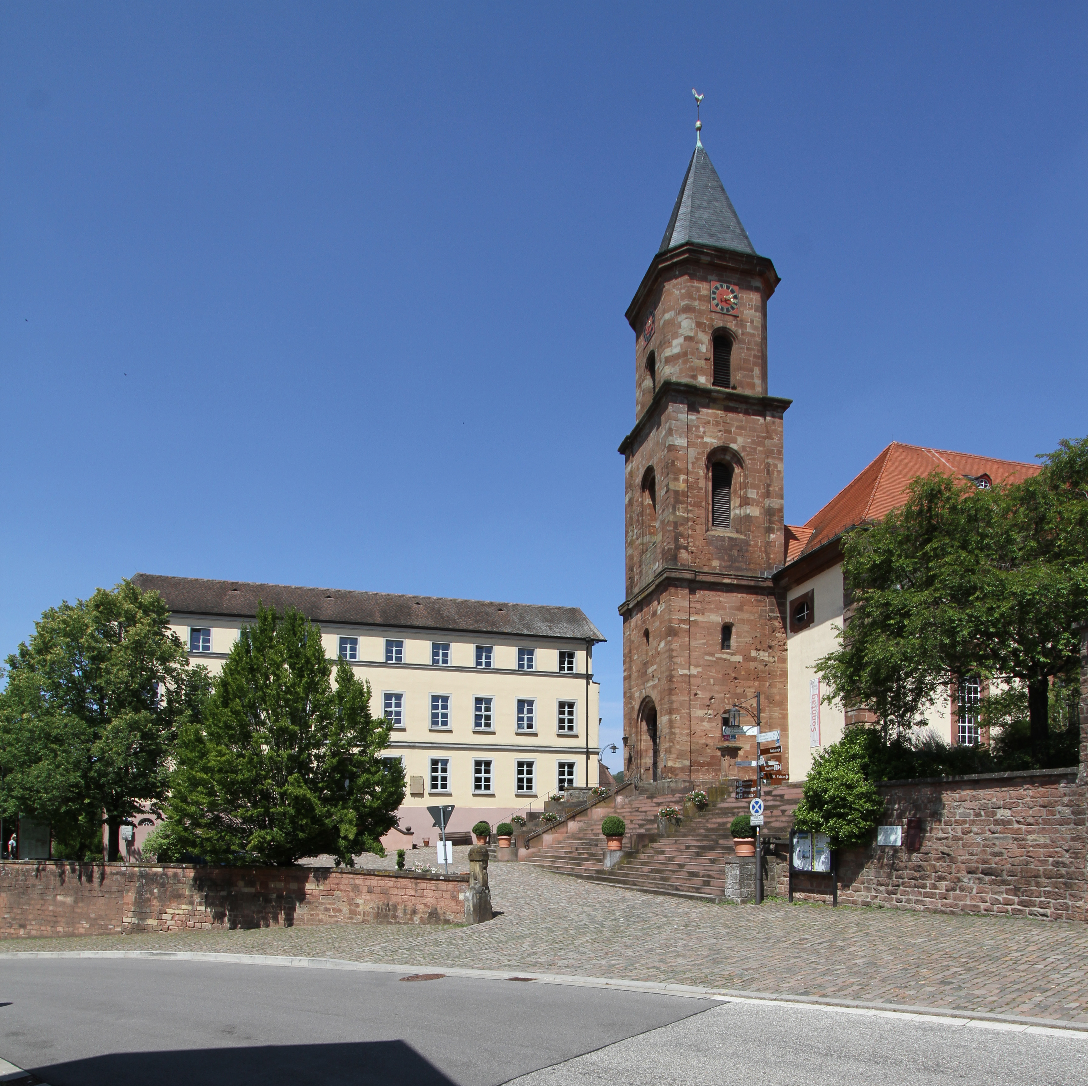 Kloster Hornbach